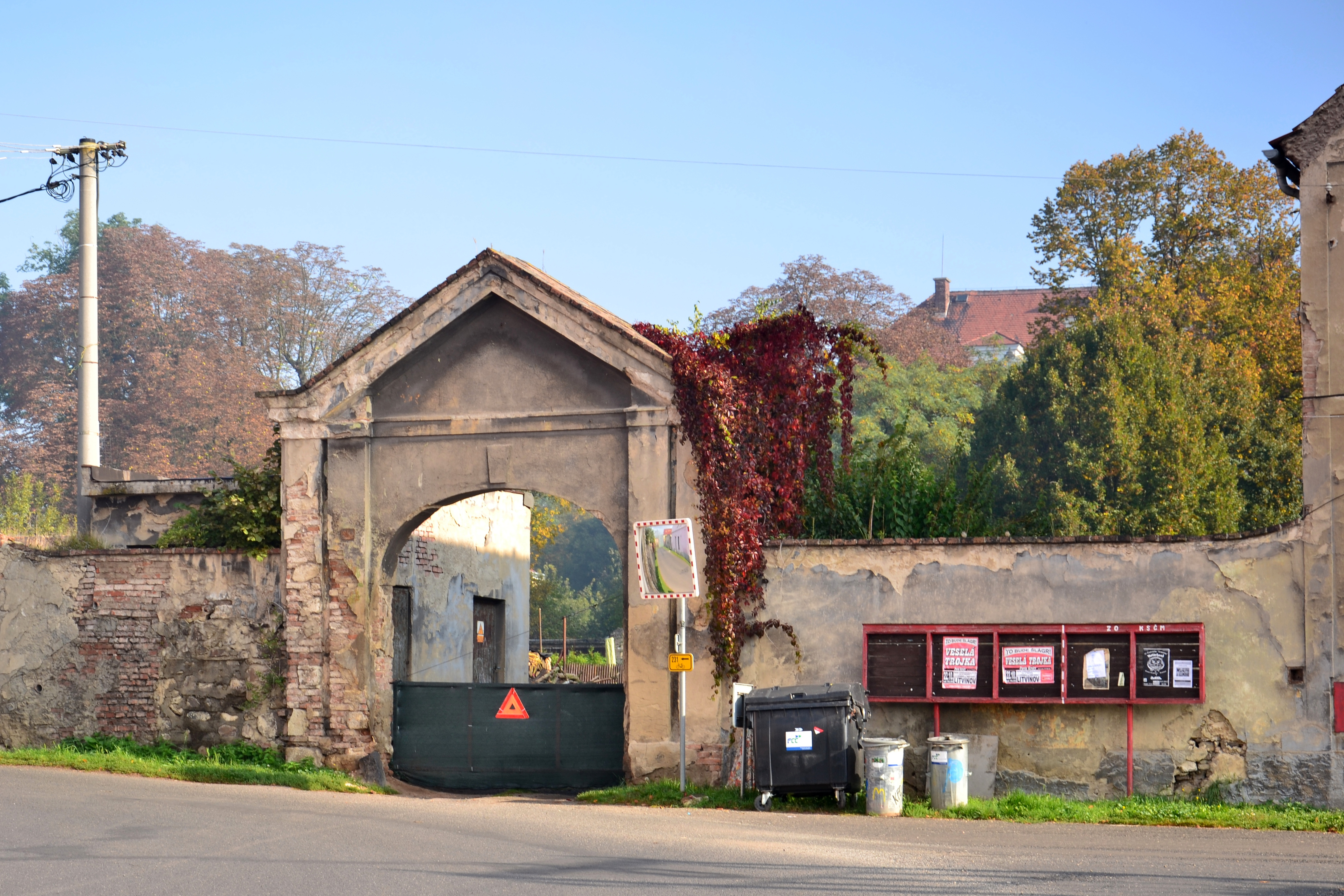 Brána do bývalého zámeckého areálu